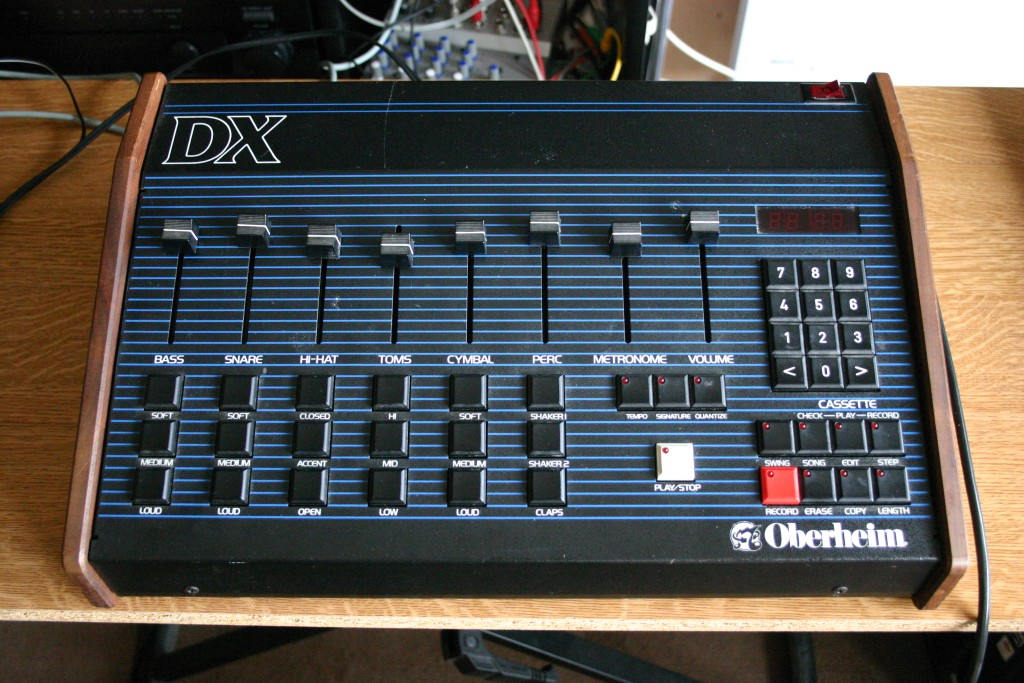 Oberheim DX drum machine (1982)